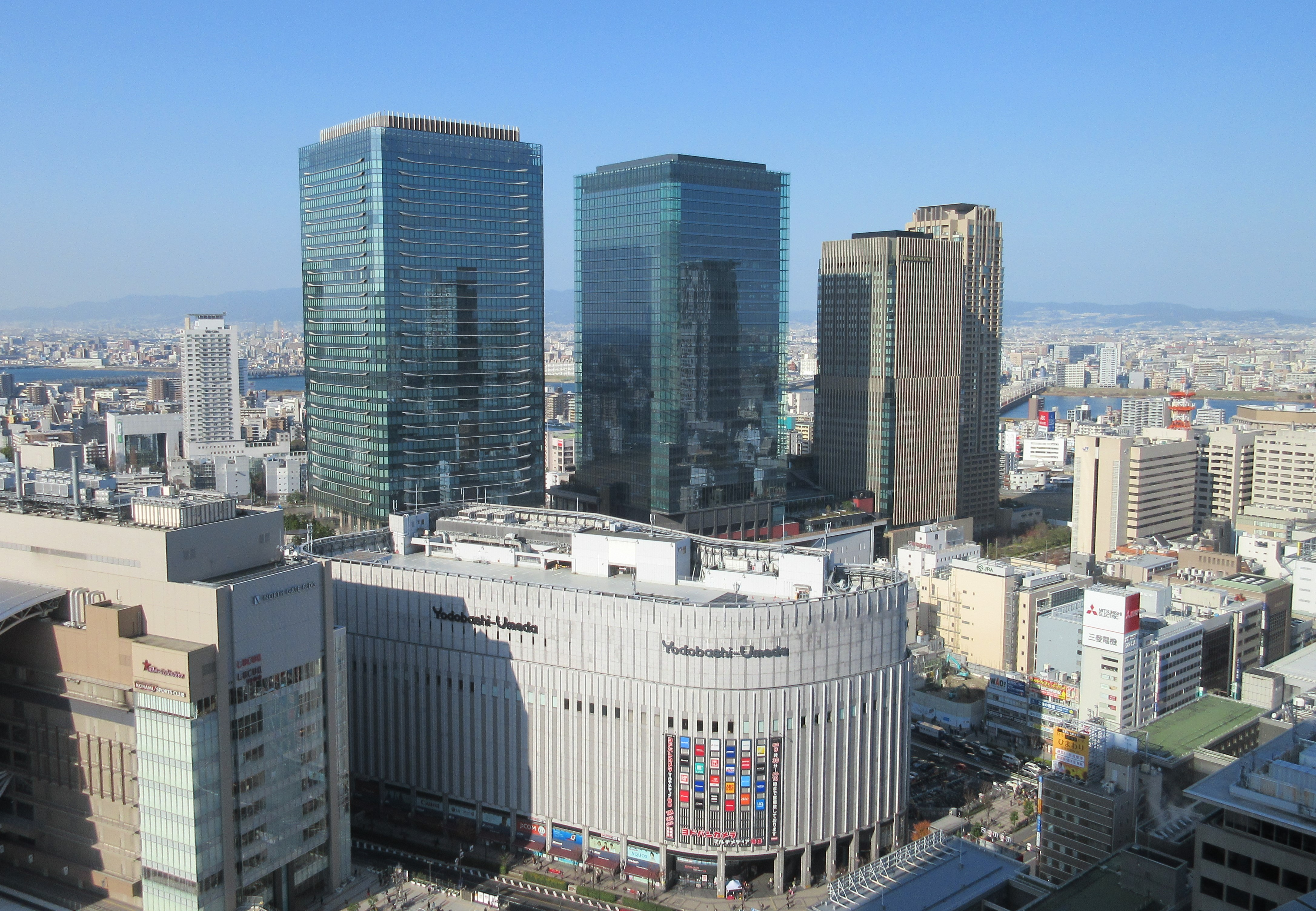 グランフロント大阪